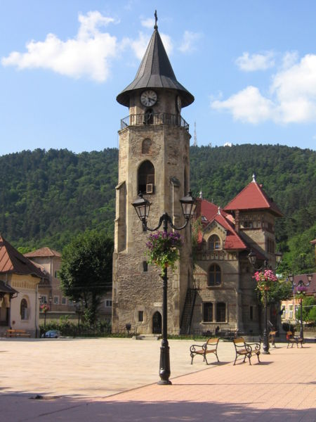 Karácsonykő: István-torony, Stephan-turn in Piatra Neamţ